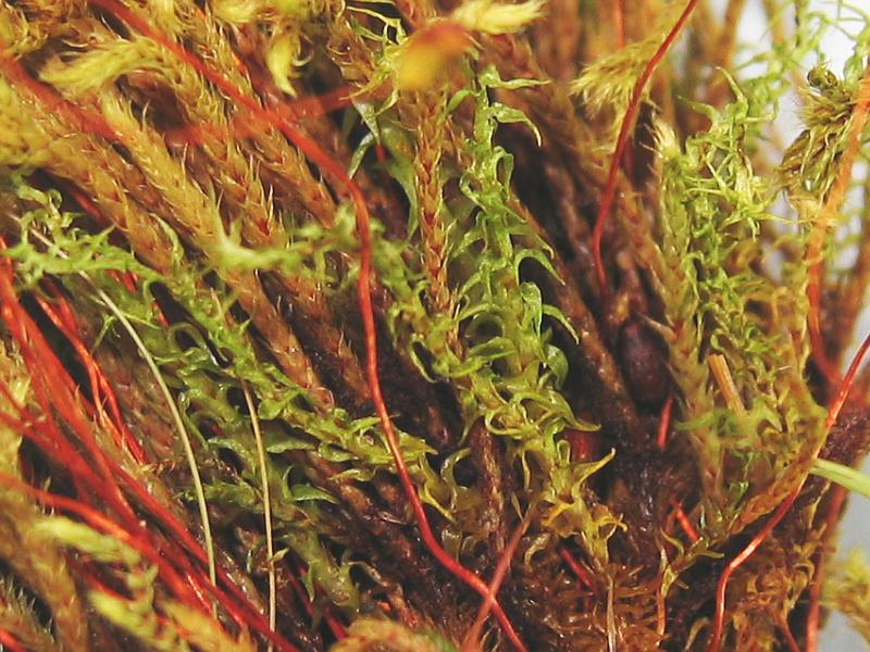 Vielblütiges Goldschlafmoos (Campylium polygamum)